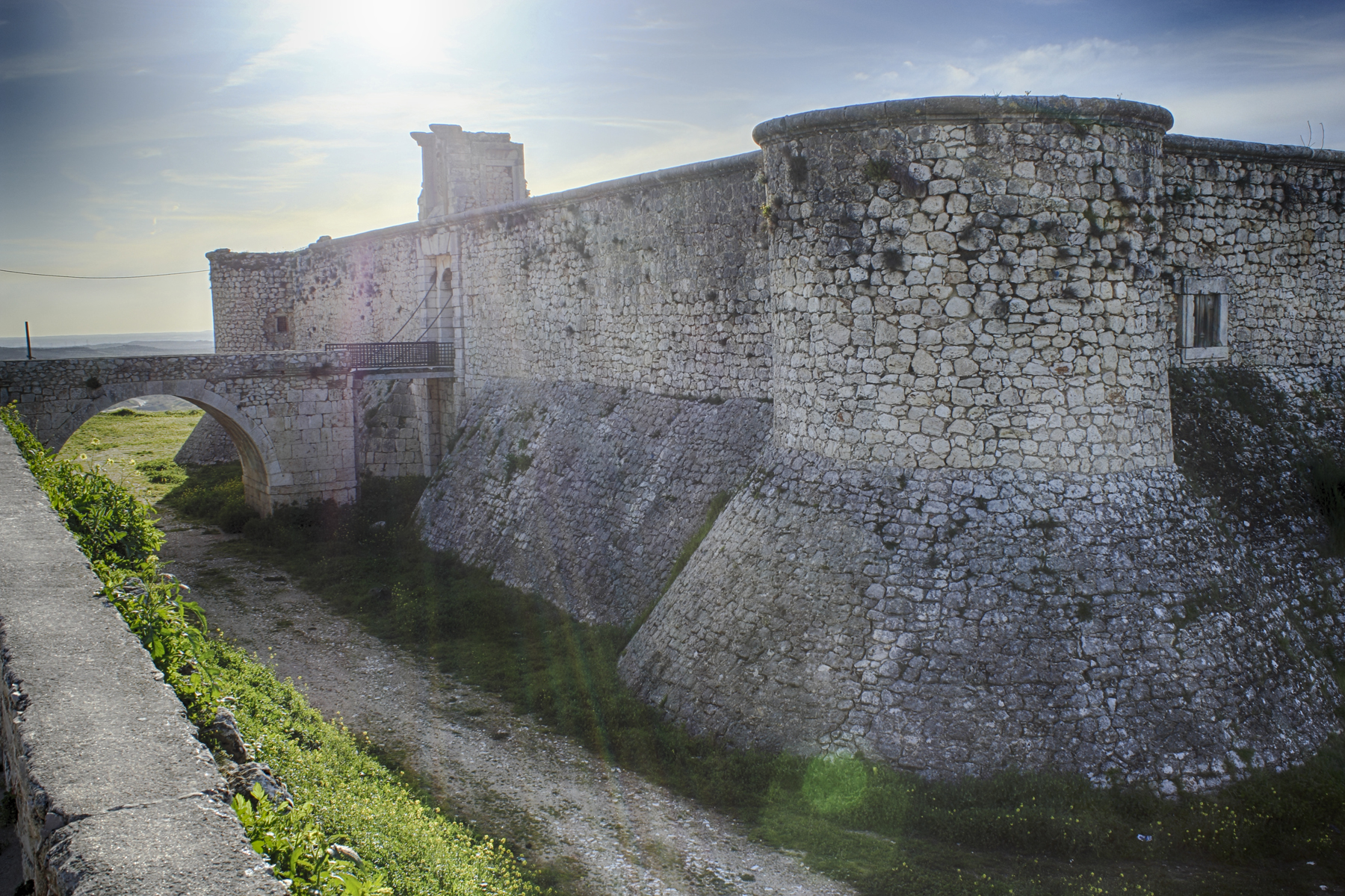 Castillo de los Condes, Siglo XV. Forma parte del Conjunto Histórico-Artístico de Chinchón según la declaración de 1974. Chinchón Comunidad de Madrid España